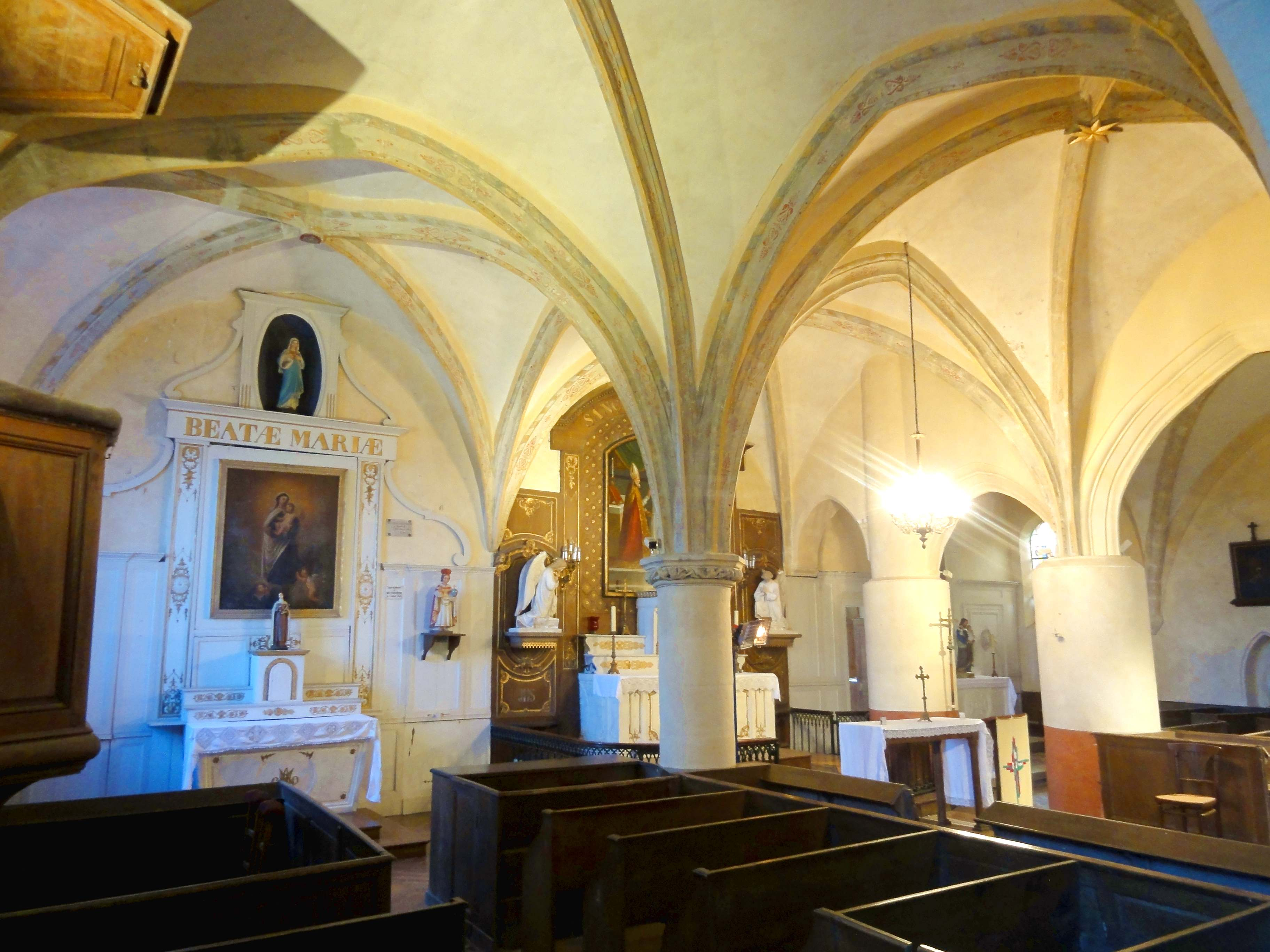 Intérieur de l'église - voir titre.